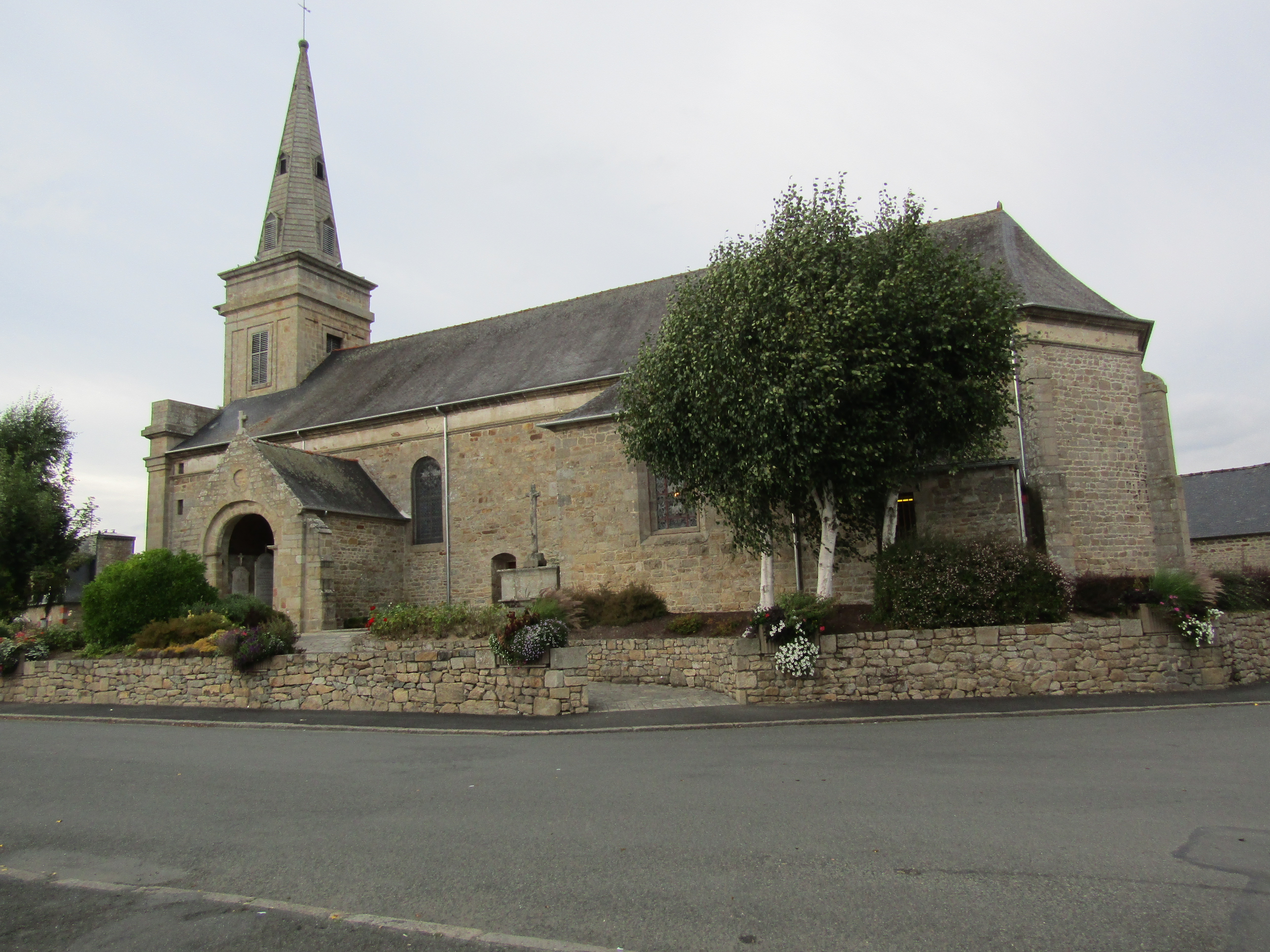 Eglise Saint-Pierre de Ploumagoar